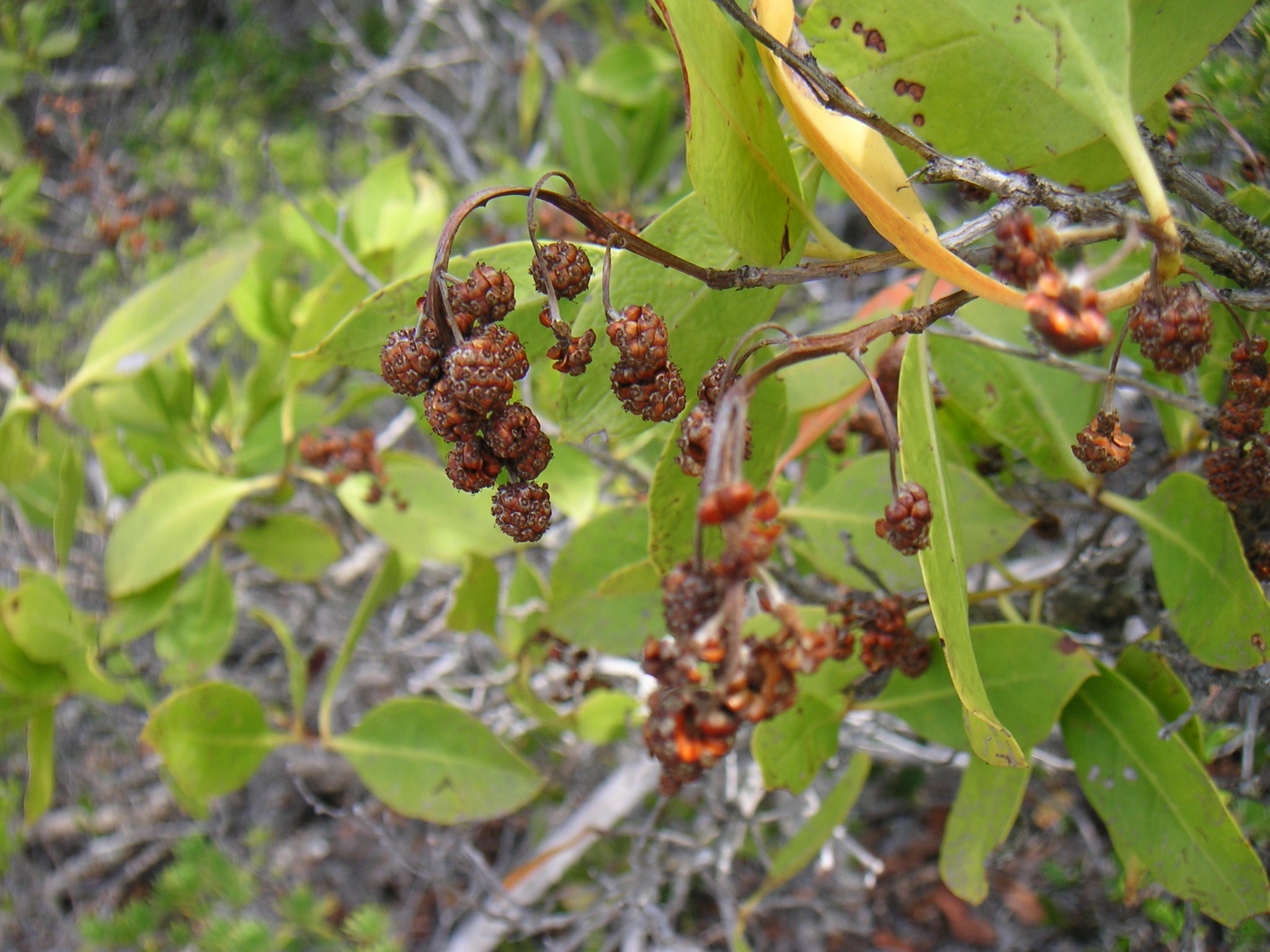 Conocarpus erectus (Combretaceae)